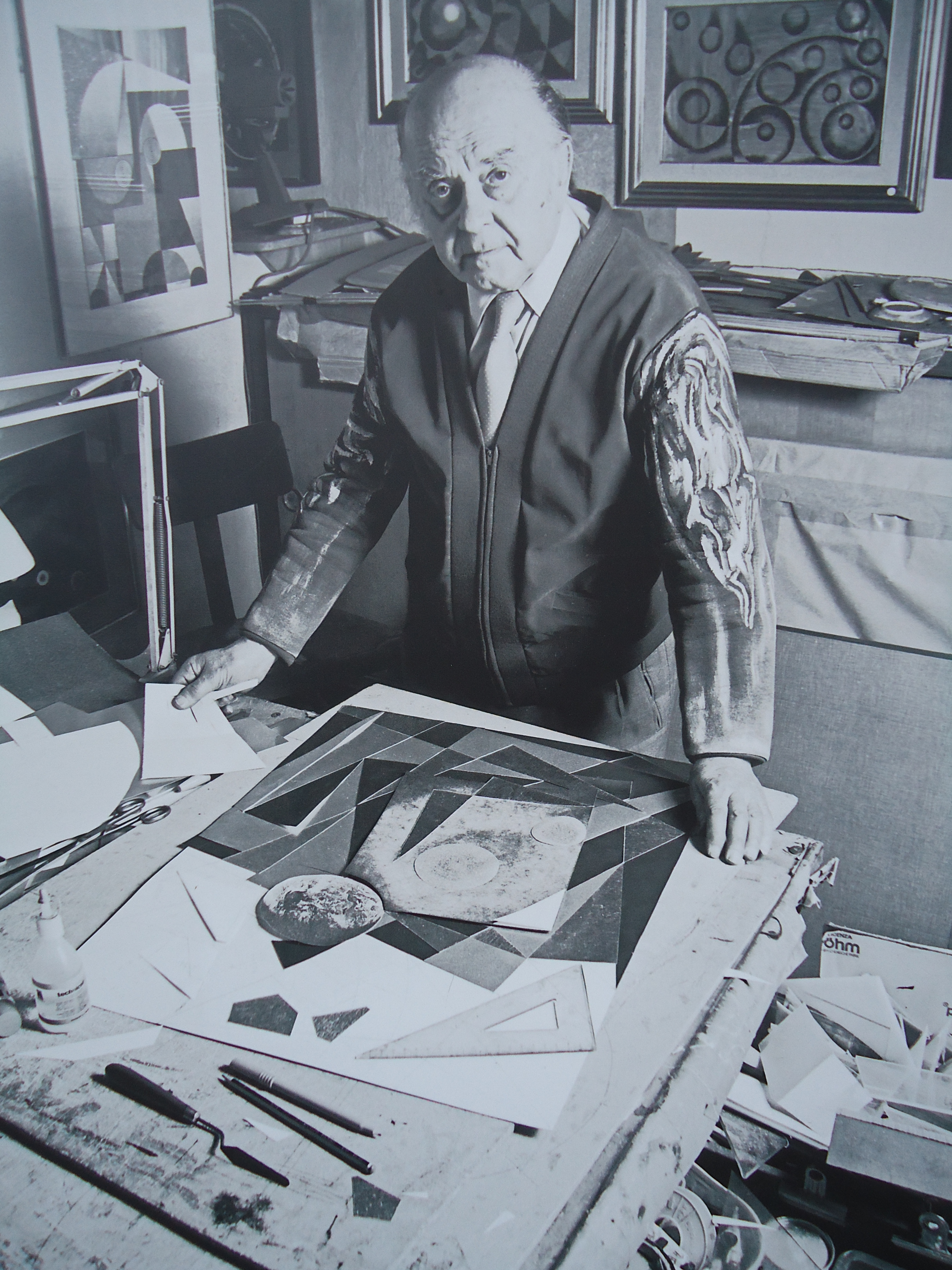 Николай Дюлгеров в ателието си в Торино през 1970-те.